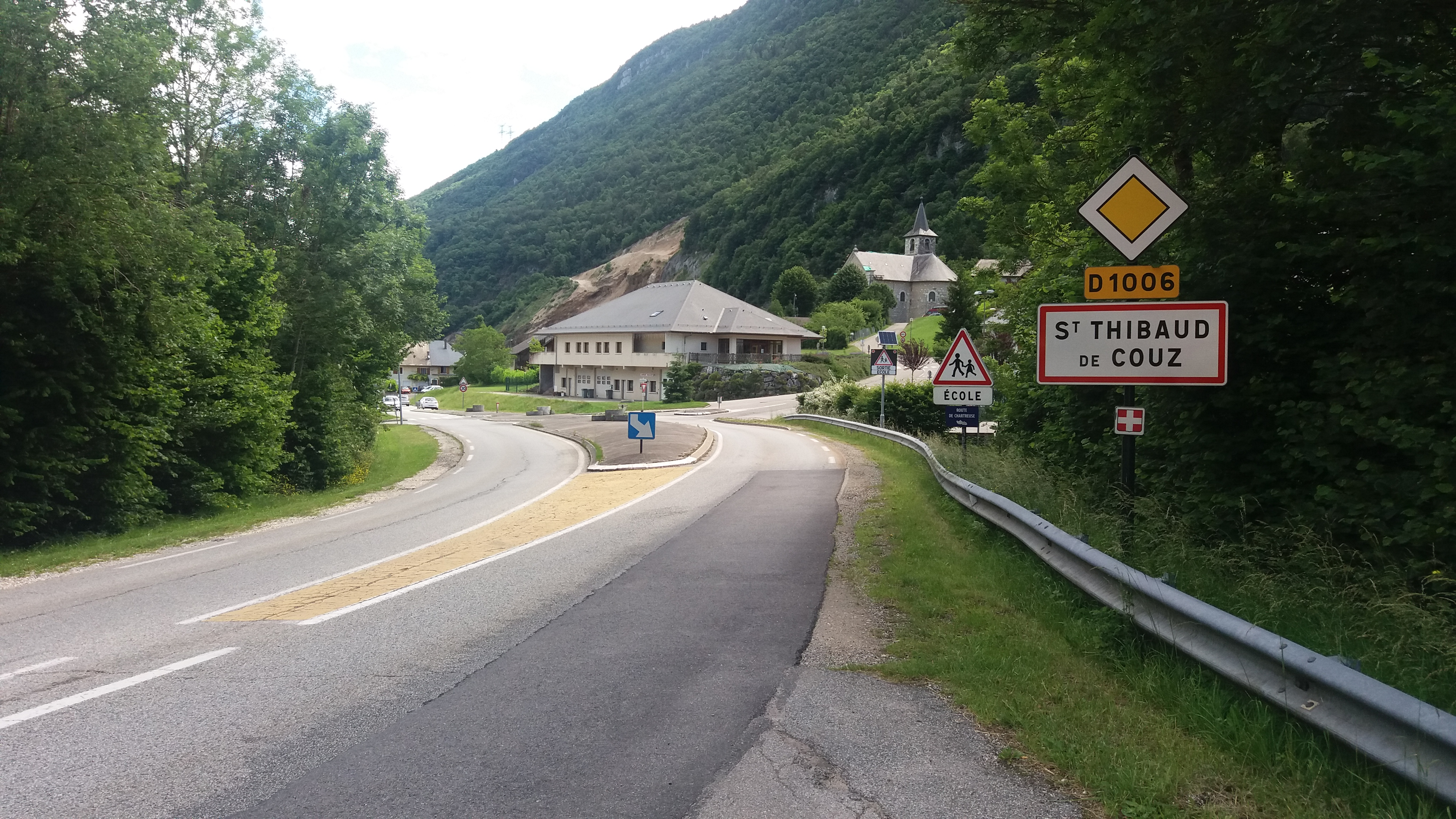 Entrée de Saint-Thibaud-de-Couz. Photo prise le 06.06.2020